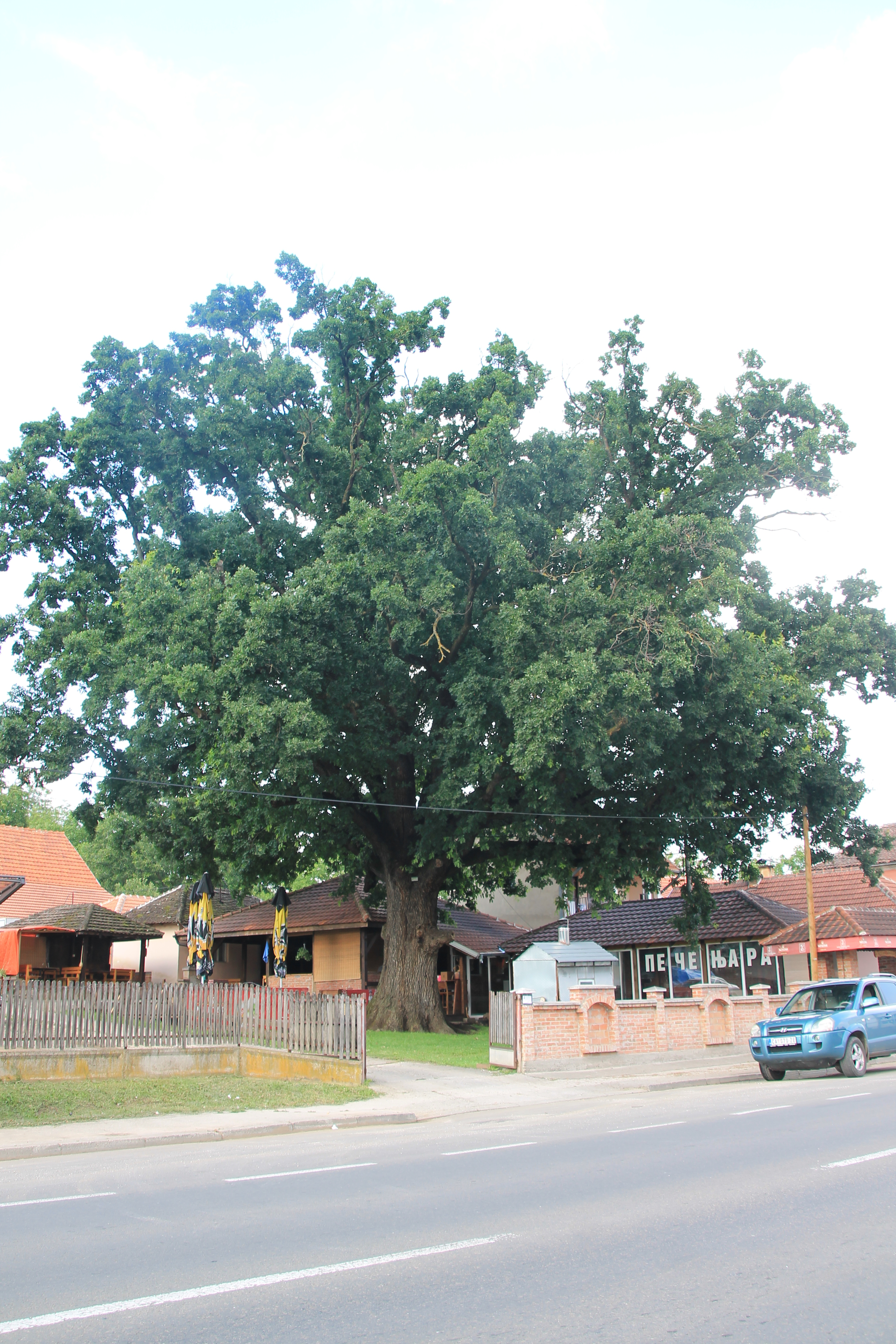 Timotijevića hrast